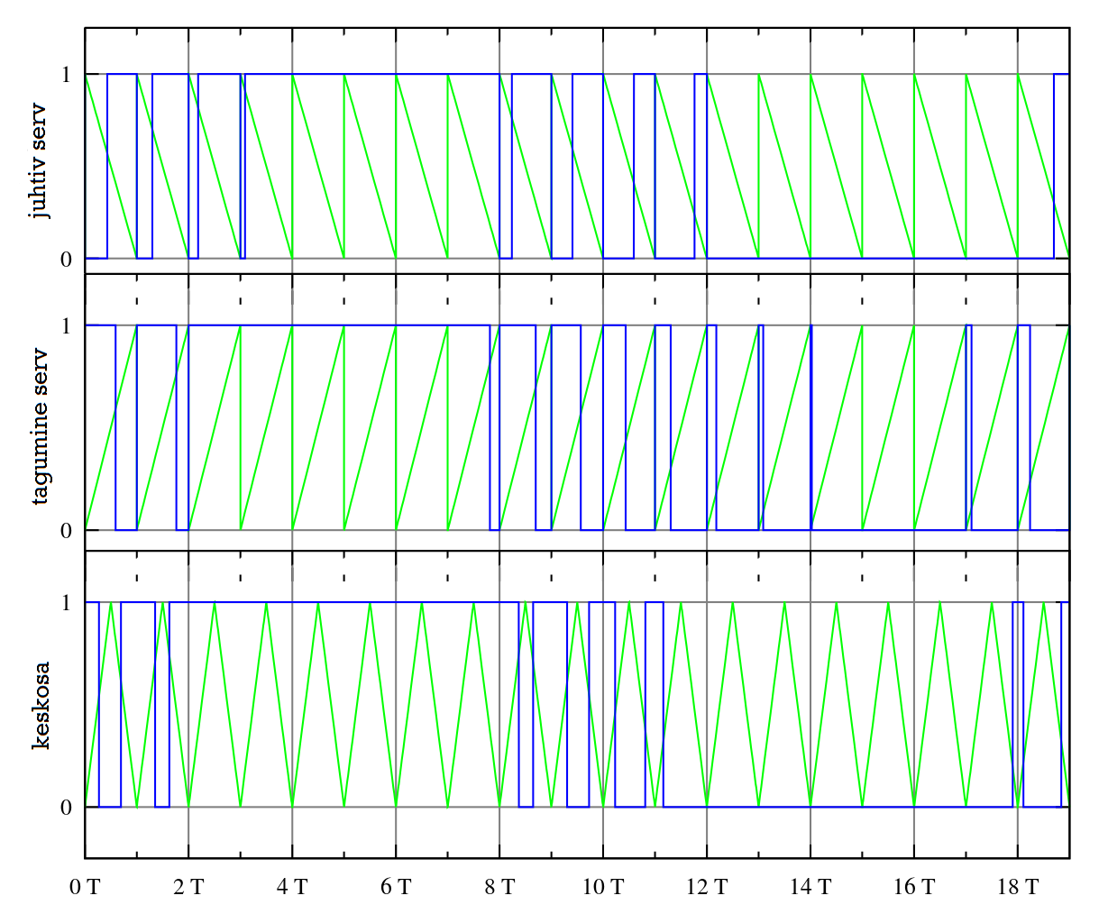 Kolm pulsilaiusmodulatsiooni signaali genereerimise viisi.